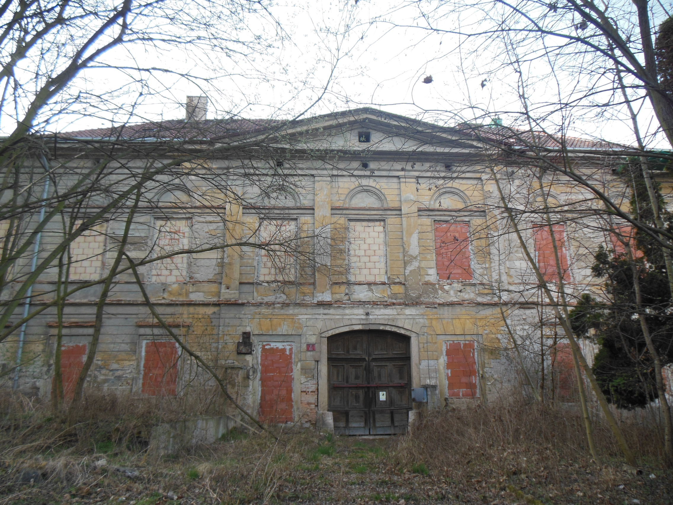 Praha-Sedlec. Zámek č. 7/19 v ulici V Sedlci.